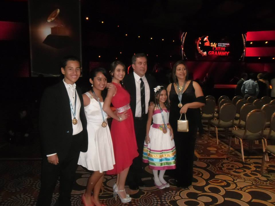 Eslabones Kids en la 14a Entrega Anual del Latin GRAMMY.